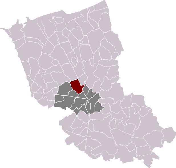 Locatie gemeente Arneke in arrondissement Duinkerke. Zelfgemaakt. Location of Arnèke municipality in the arrondissement of Dunkirk. Self made. Localisation de la commune d'Arnèke dans l'arrondissement de Dunkerque. Fait moi-même.